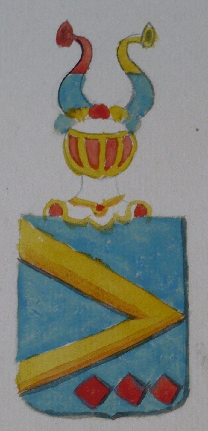 Seglmerket til Finn Hanssen